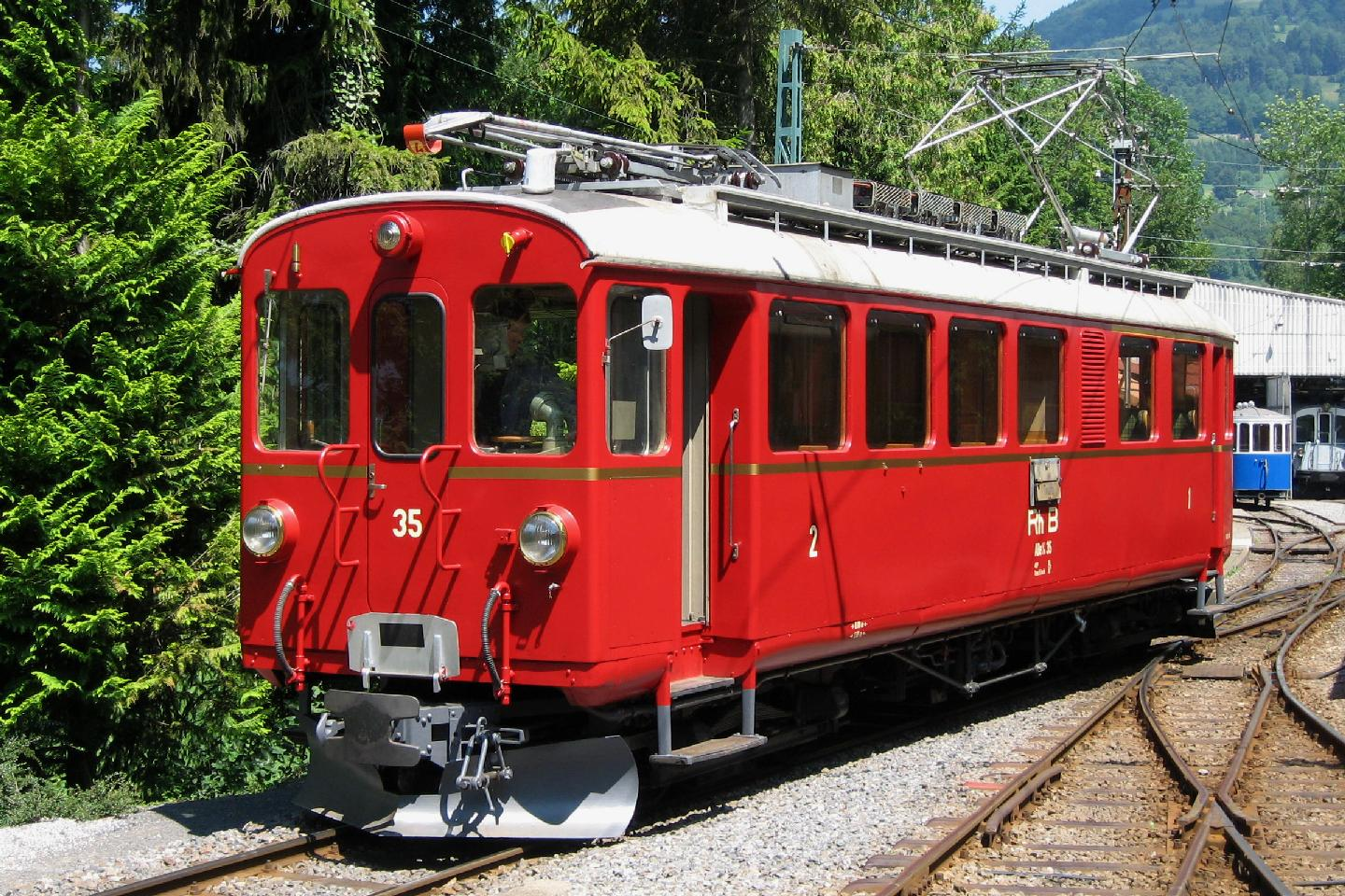 Motorwagen ABe 4/4 35 der Rhätischen Bahn (RhB), bei der Museumsbahn Blonay-Chamby (BC) in Chamby-Musée (Chaulin), im Sommer 2011.